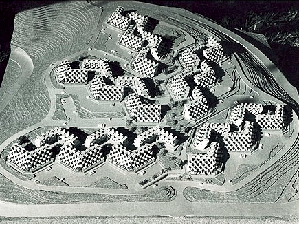 מודל שכונת רמות פולין בירושלים הוקם ביוזמת כולל פולין